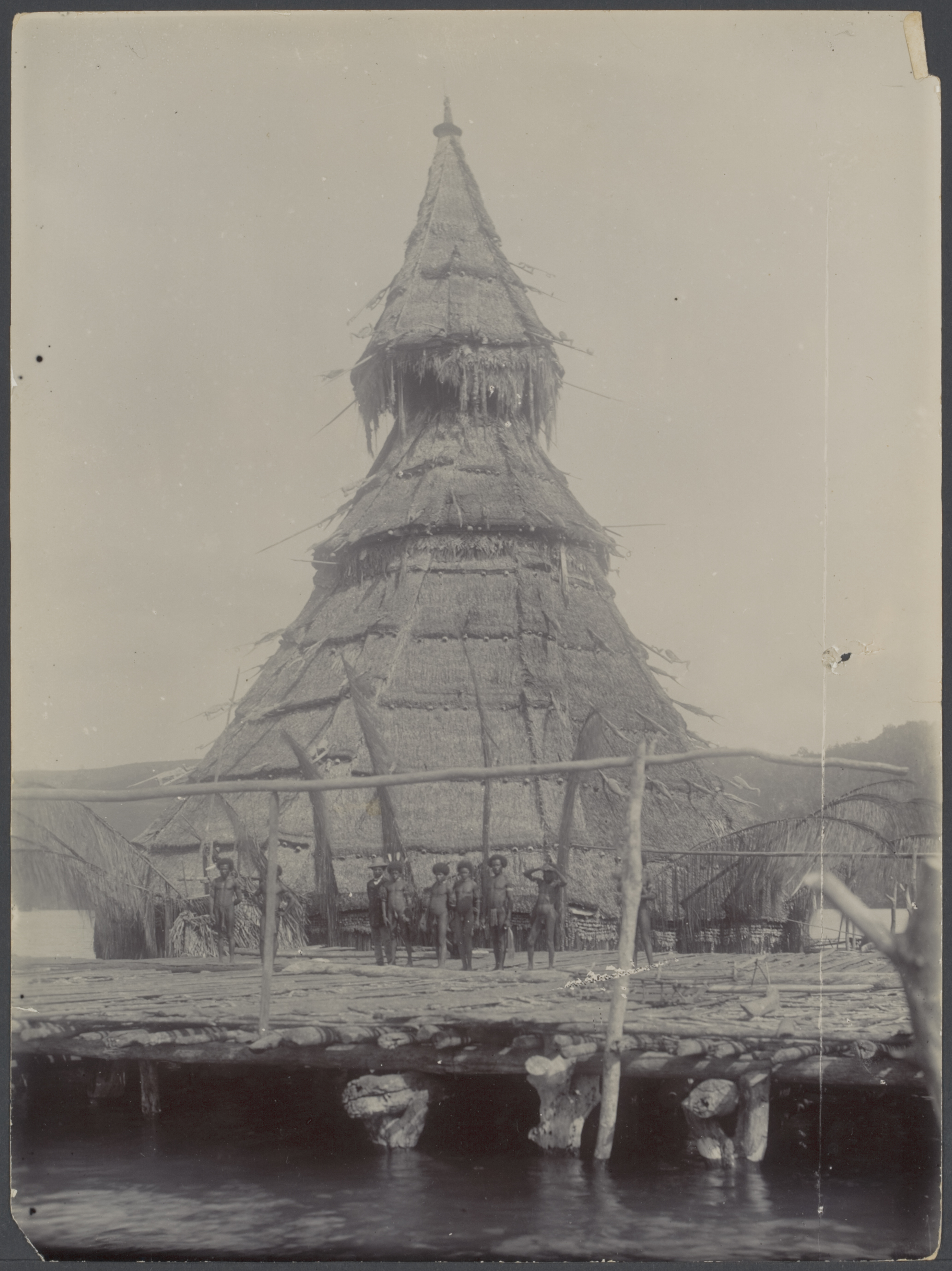 Academische Collecties: 1899-1900, Siboga-expeditie naar Nederlands Oost-Indië, onder leiding van Max Wilhelm Carl Weber Groep mannen voor een palmhuis op palen (het mannenhuis)